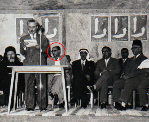 1959 - מפגש במגזר הערבי בנצרת עם משה שרת